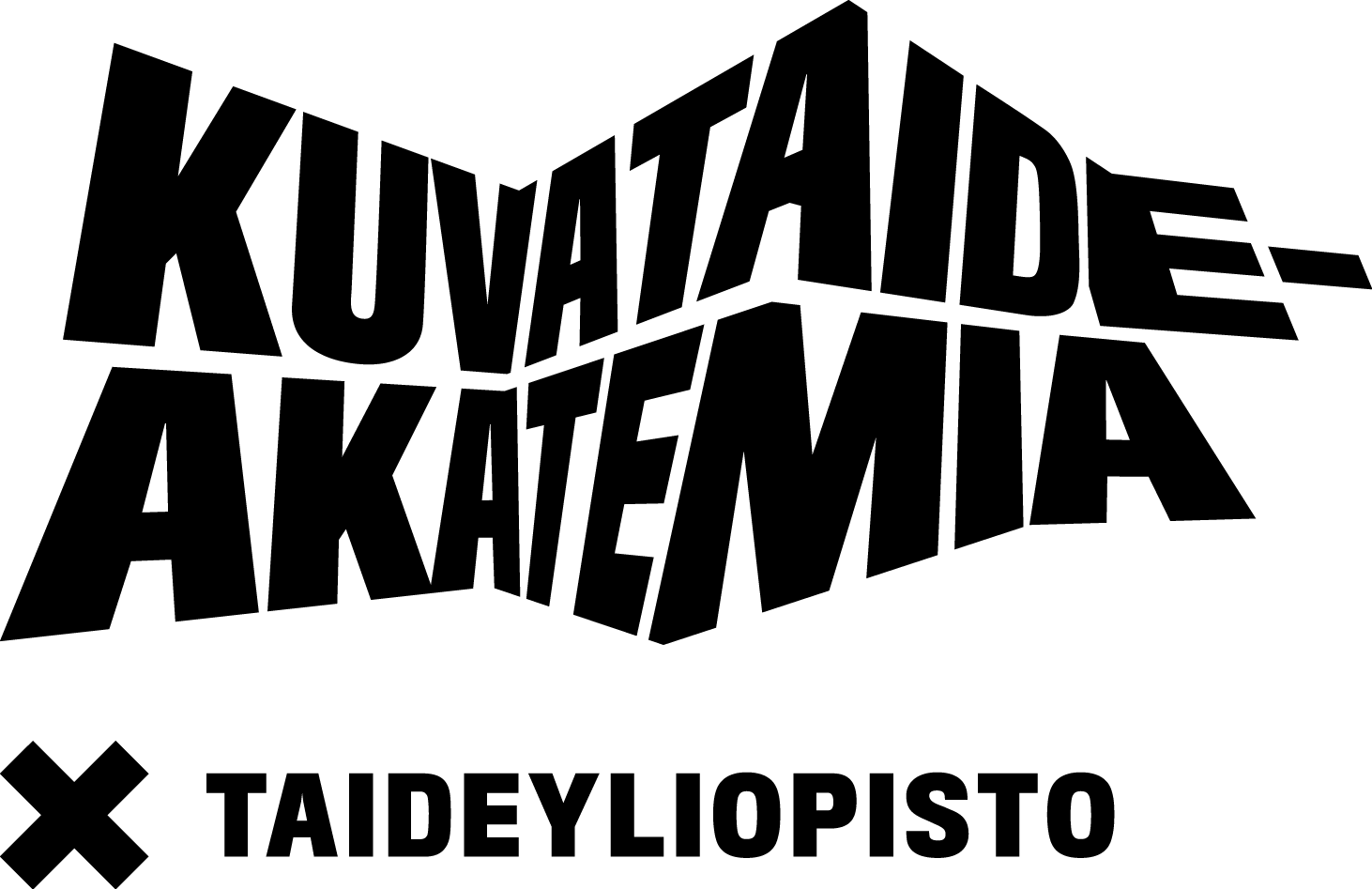 Taideyliopiston Kuvataideakatemian logo